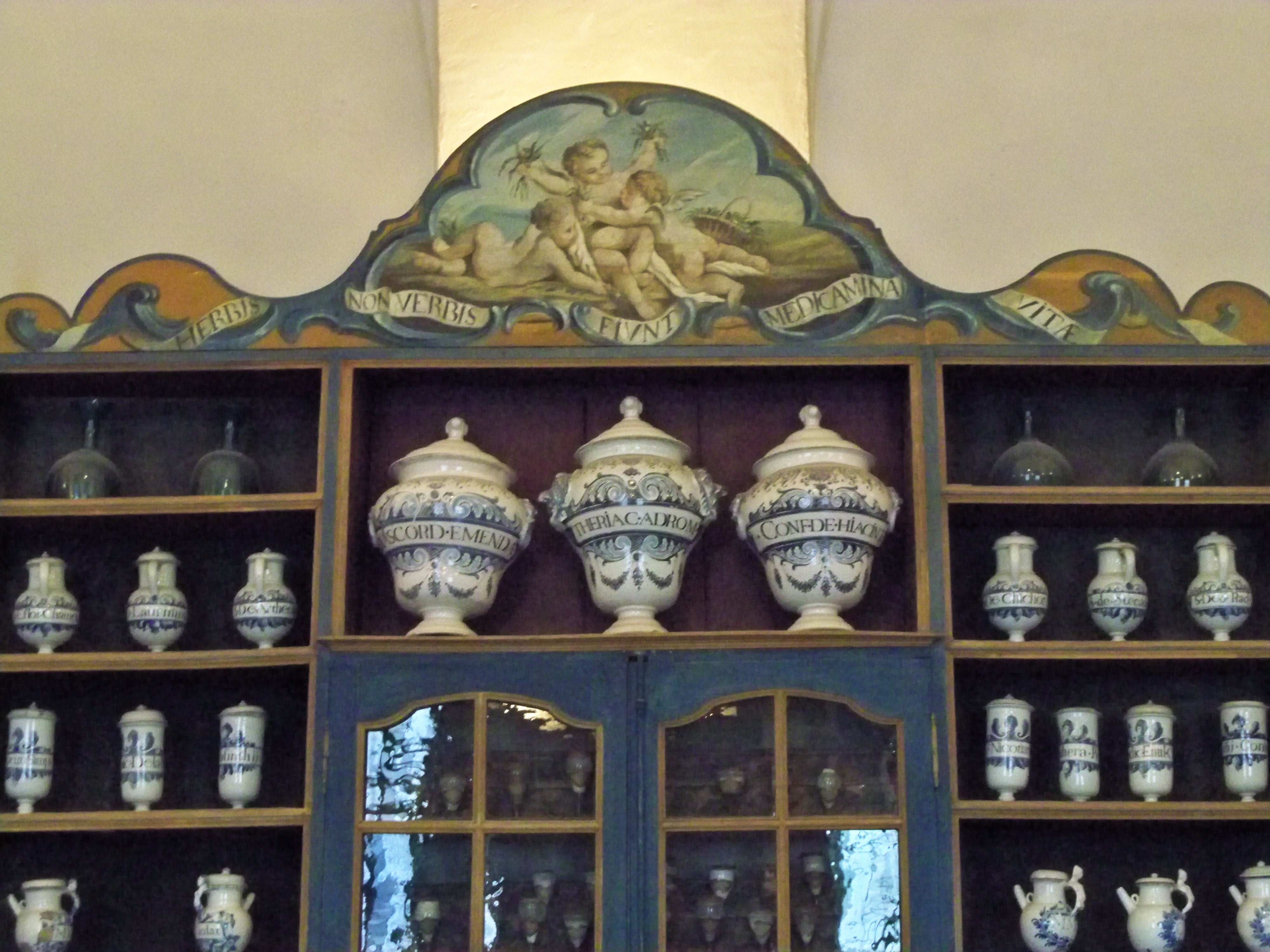 Hôtel-Dieu de Carpentras (84), monument classé Mérimée, peintures classées Palissy